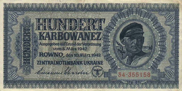 100 karbovanets